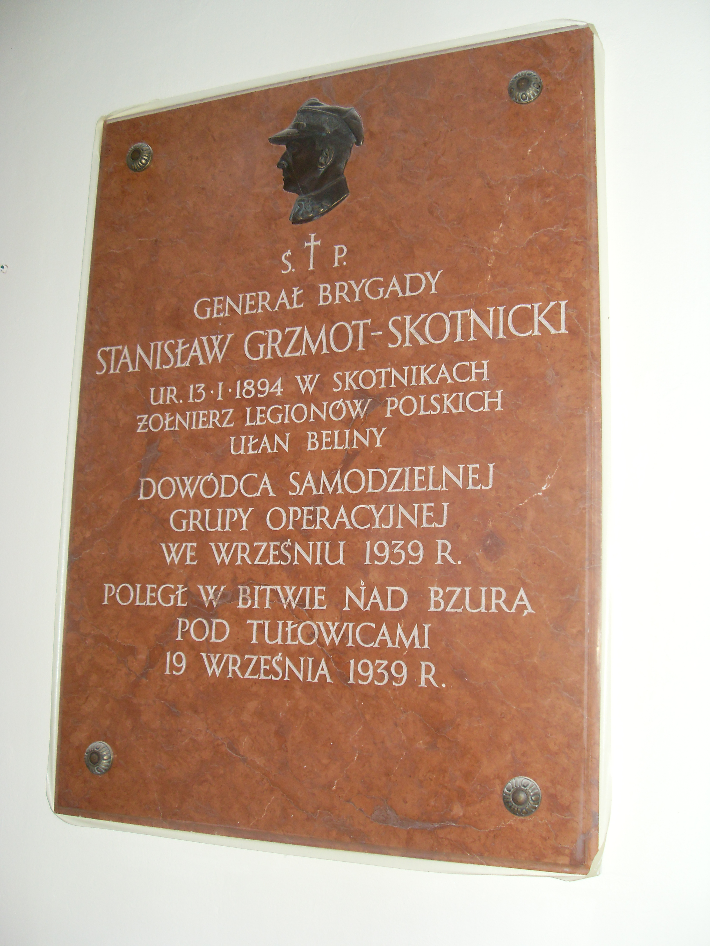 Kościół w Brochowie - tablica ku czci gen. Stanisława Grzmota-Skotnickiego, który poległ w 1939 r. w niedalekich Tułowicach.